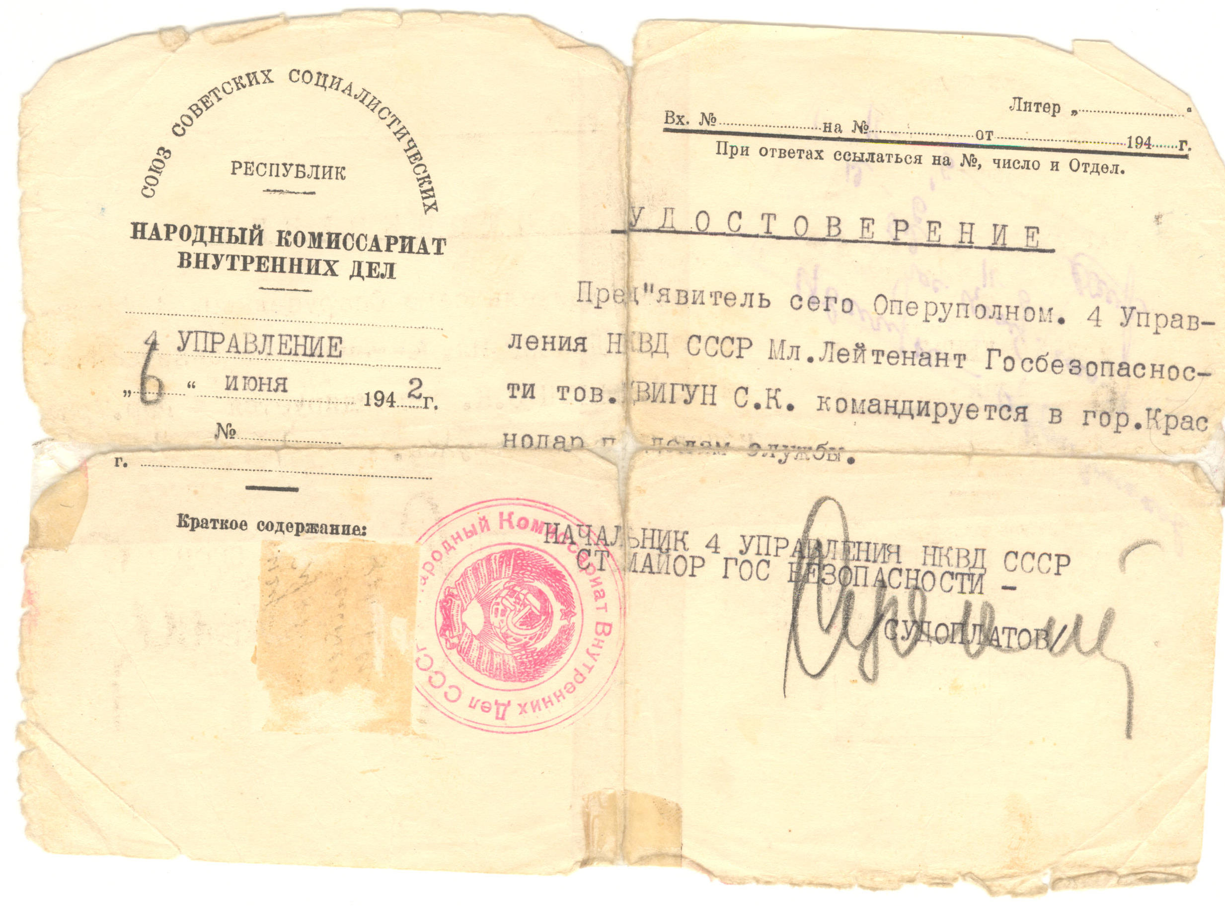 Удостоверение Семёна Цвигуна, подписанное П. А. Судоплатовым